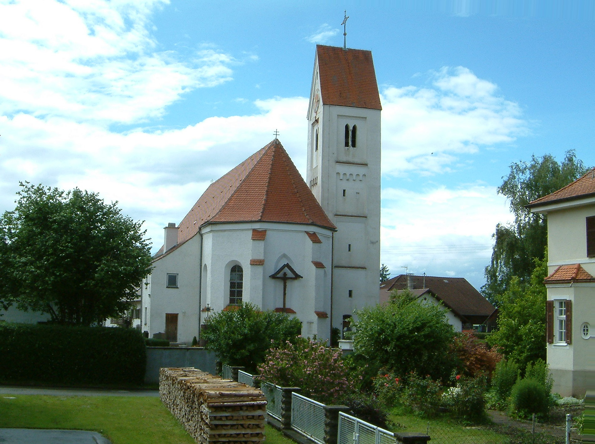 Die Kirche von Warmisried (Unterallgäu)